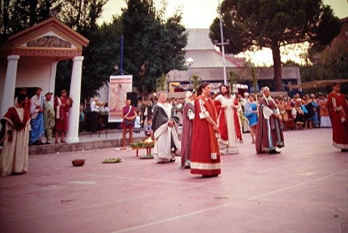 velimna, etruscan revival in Ponte S. Giovanni, Perugia, Umbria, Italy